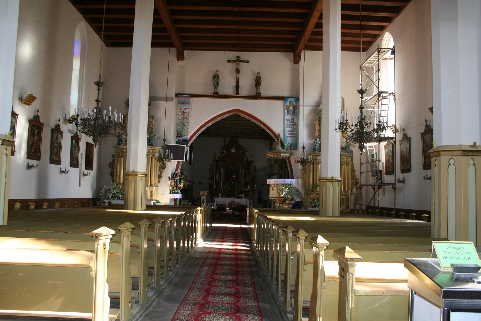 Łasin kościół św Katarzyny Aleksandryjskiej